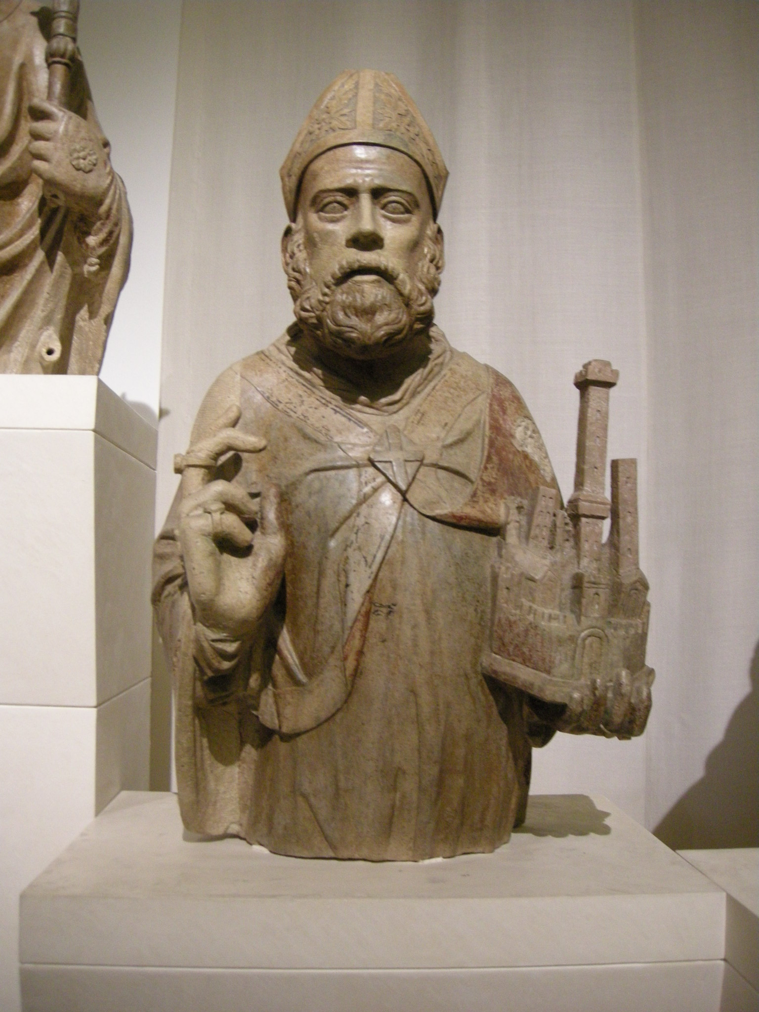 Pierpaolo dalle Masegne, San Petronio. Dettaglio dal Gruppo della Giustizia con sei santi protettori, dalla Loggia della Mercanzia a Bologna, oggi esposto nel Museo civico medievale a Bologna.